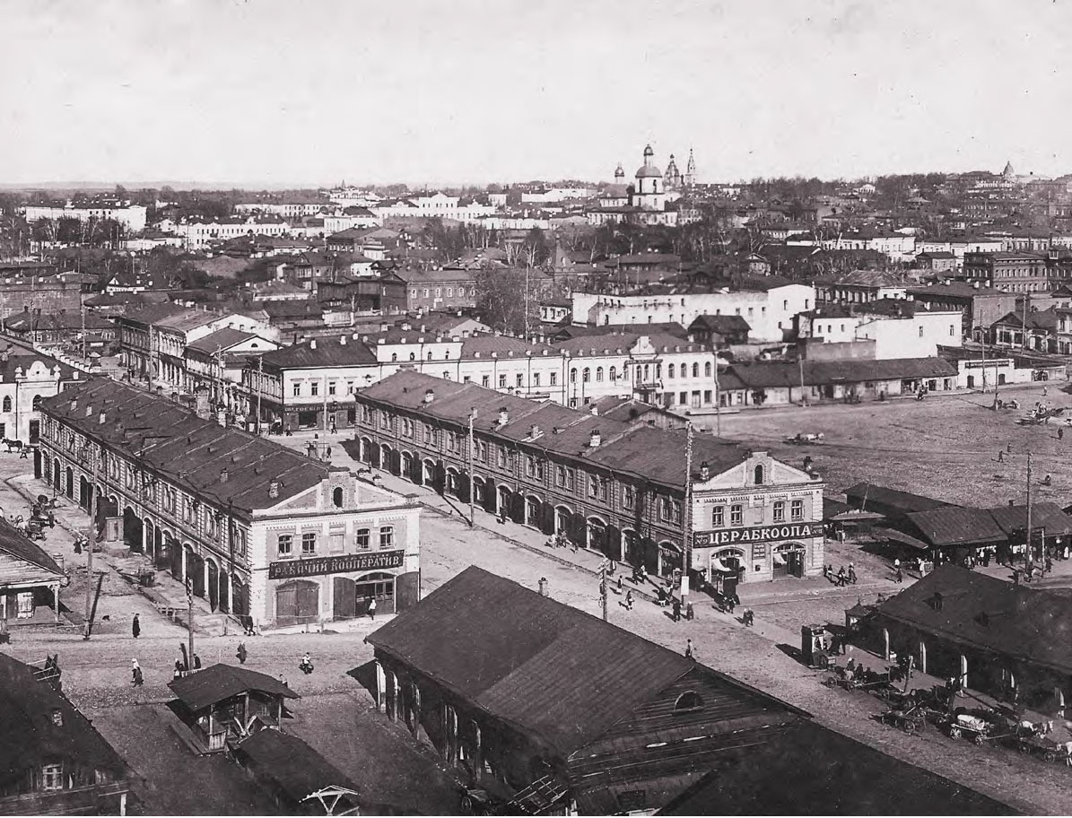 Чёрный рынок. Нач. XX века. Пермь.